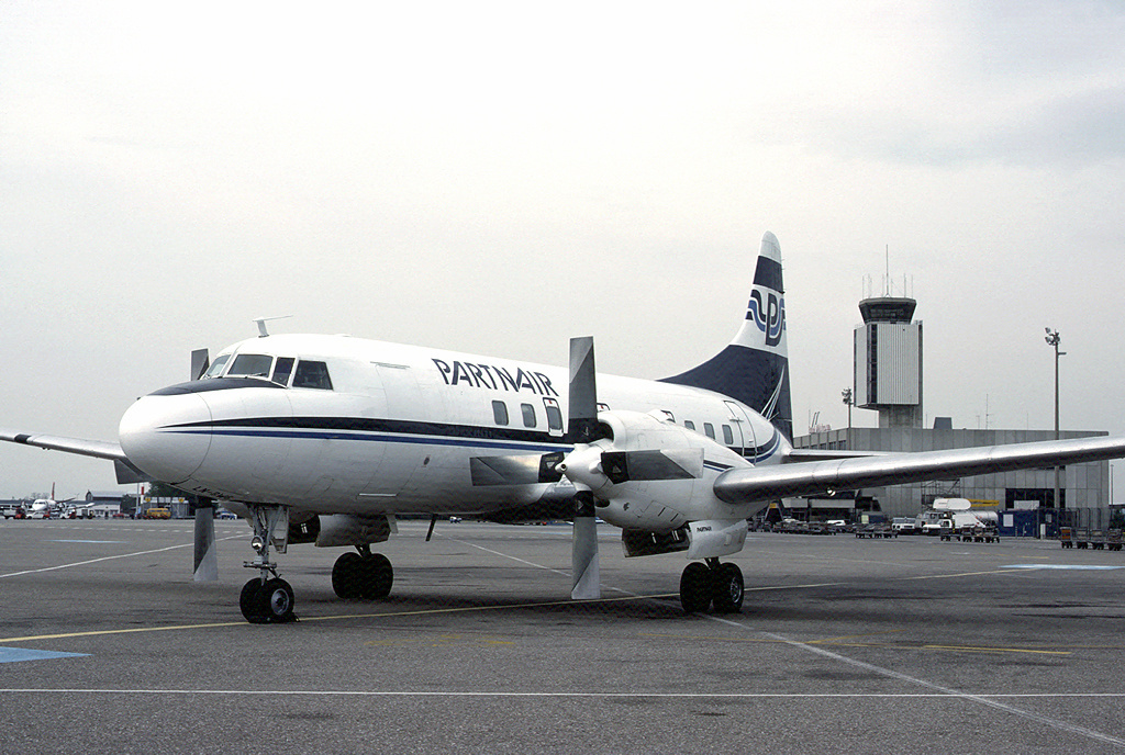 Partnair Convair 580 LN-BWG at Euroairport